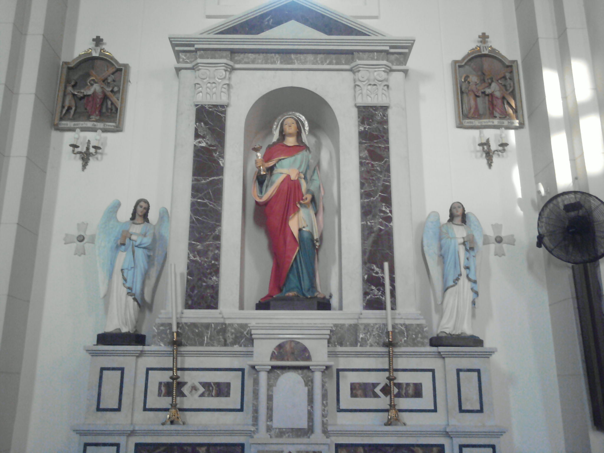 Statua di Santa Lucia custodita nella Chiesa di Maria Santissima del Rosario di Palmi